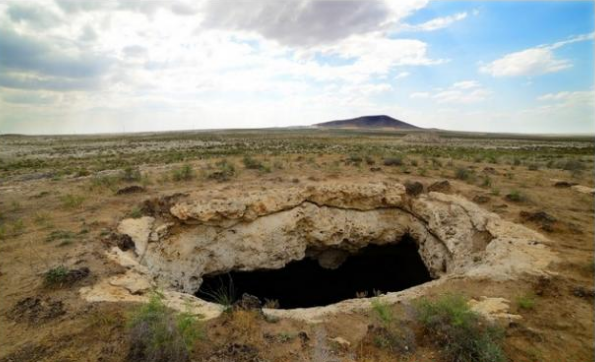 Cihanbeyli Bolluk Gölü traverten konisi